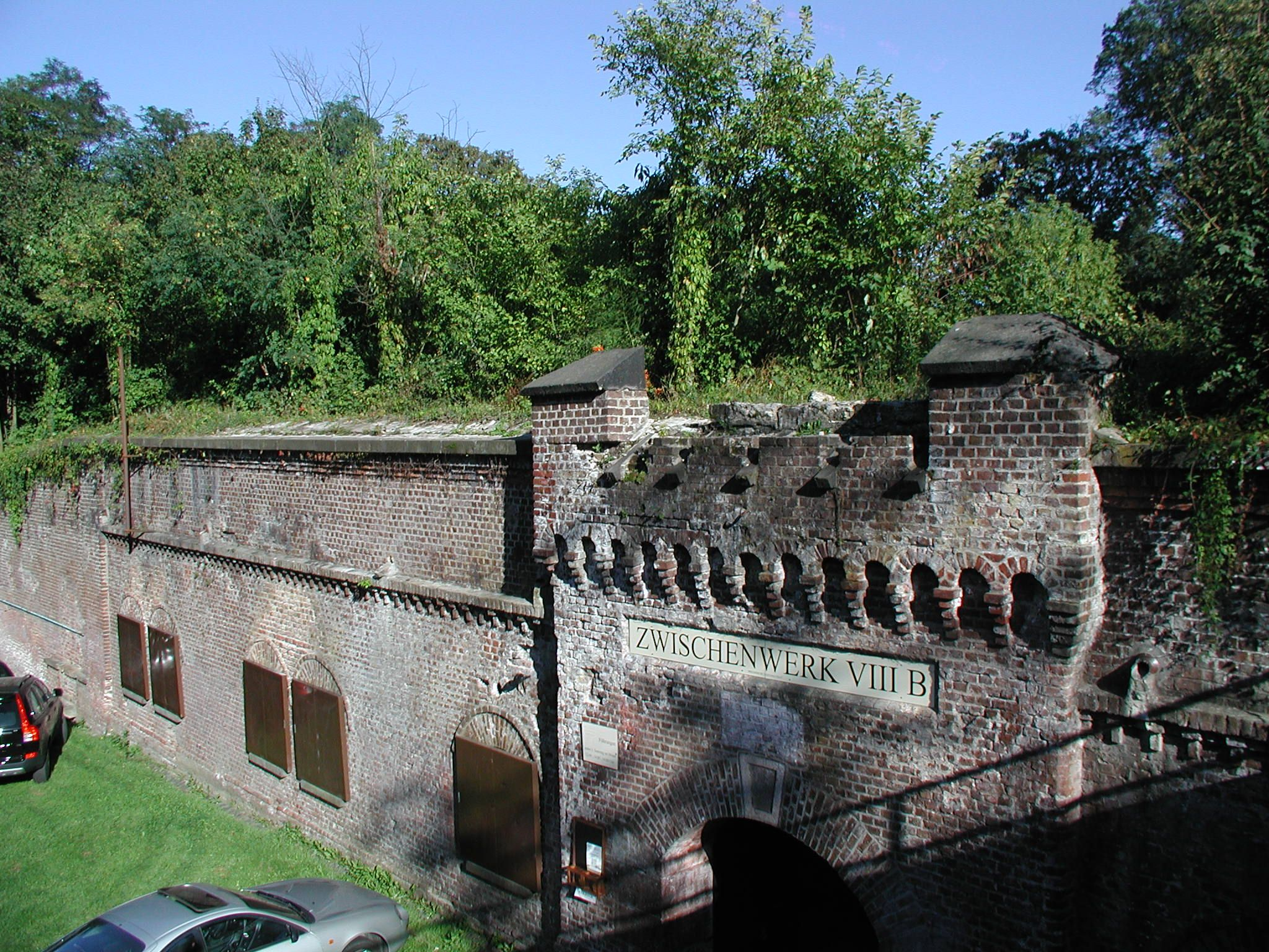 Festungsguertel-Coeln